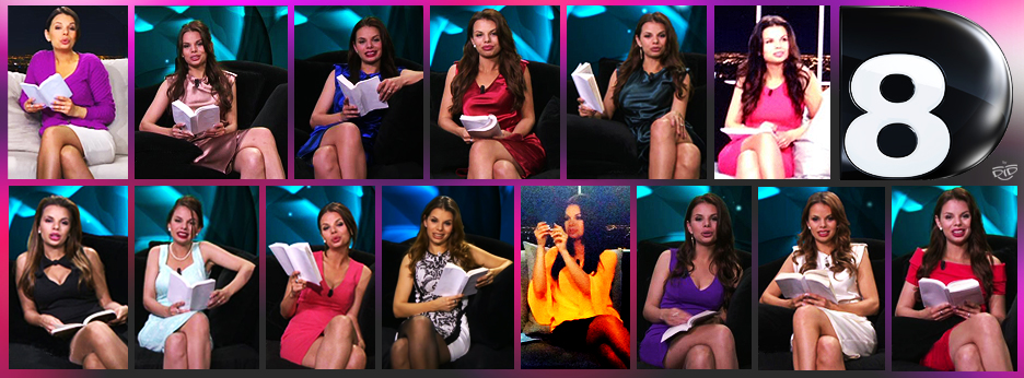 différentes lectures de l'émission Voyage au bout de la nuit